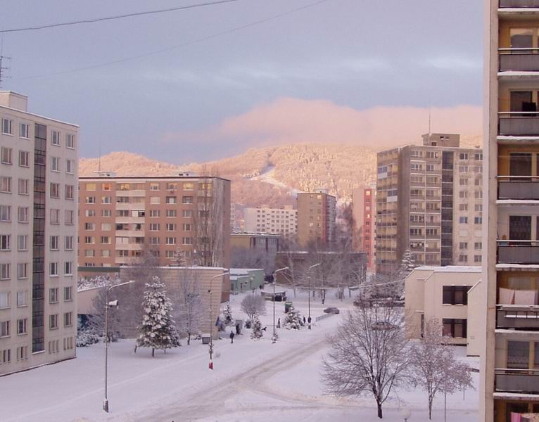 Strato Vimpreská en Detva, Slovakio. Fotita vintre.